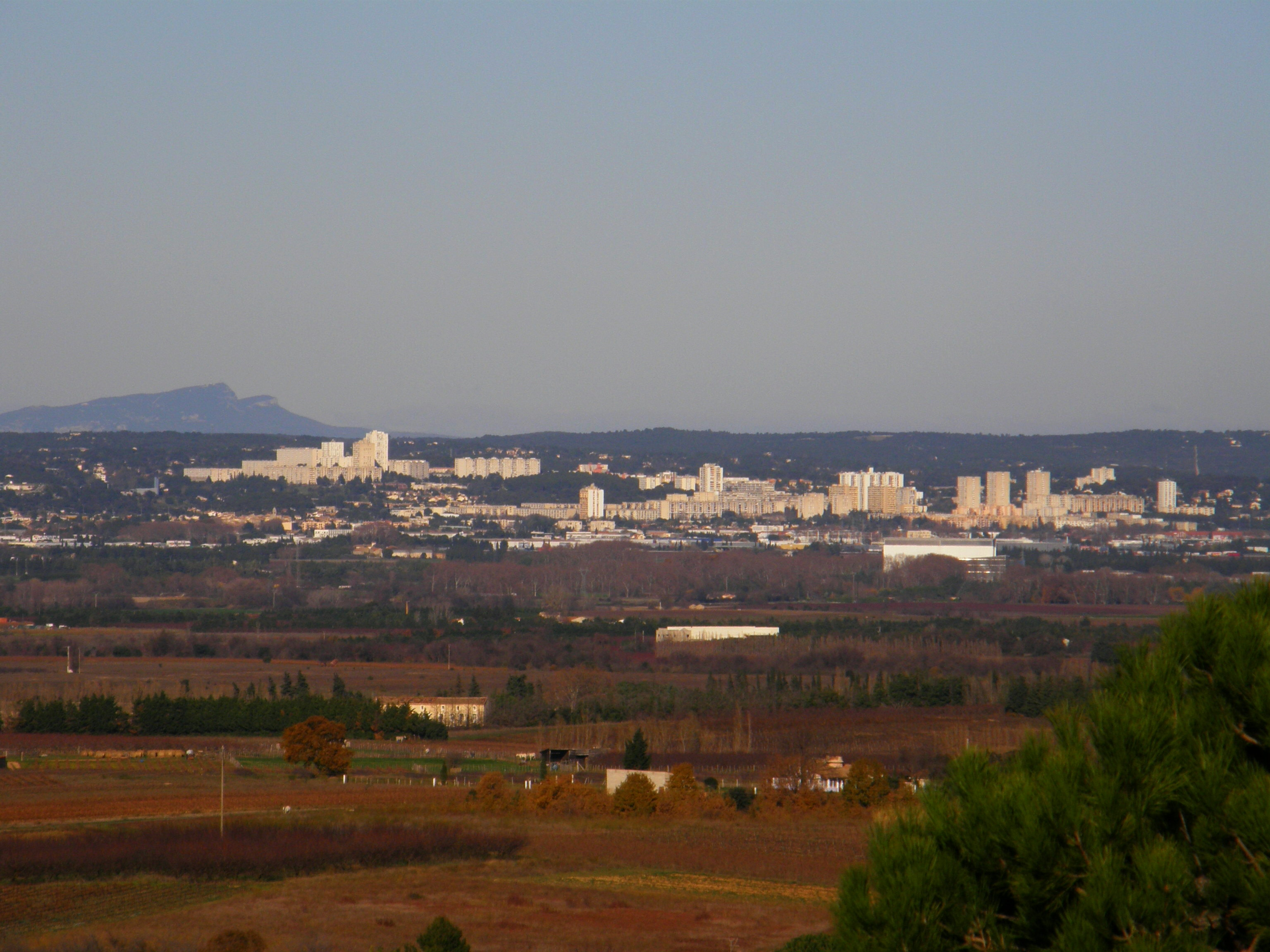 Vue sur Nîmes et la plaine du Vistre depuis le Puech Roussin, à Générac (Gard, France) View towards Nîmes and the "plaine du Vistre" from Puech Roussin, in Générac (Gard, France)